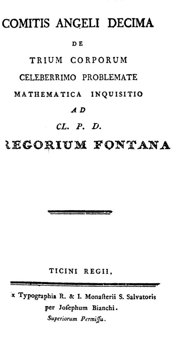 Comitis Angeli Decima De trium corporum celeberrimo problemate mathematica inquisitio. - Ticini Regii : ex typographia r. & i. Monasterii s. Salvatoris per Josephum Bianchi, [1780]. - 112, [2] p., [1] c. di tav. : ill. ; 8º .